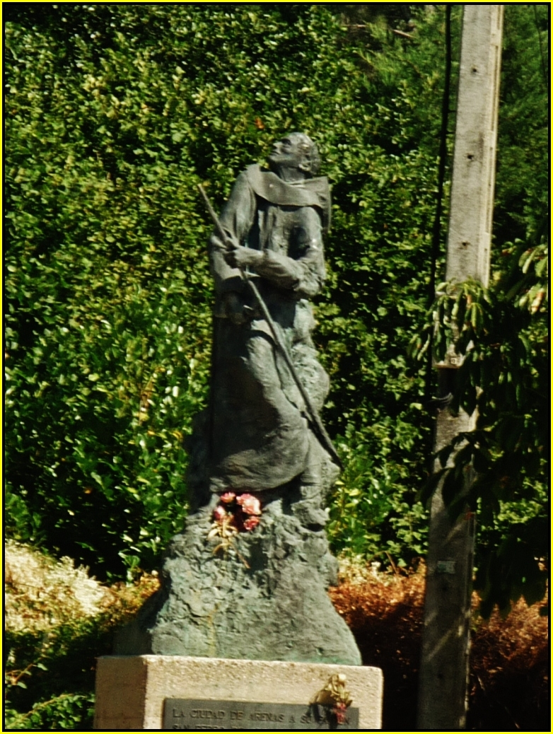 Estatua de San Pedro de Alcantara, Arenas de San Pedro